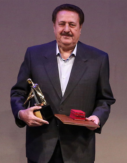 کریم صالح عظیمی در مراسم اختتامیه سی و چهارمین جشنواره موسیقی فجر تالار وحدت تهران ۱۳۹۷/۱۱/۳۰